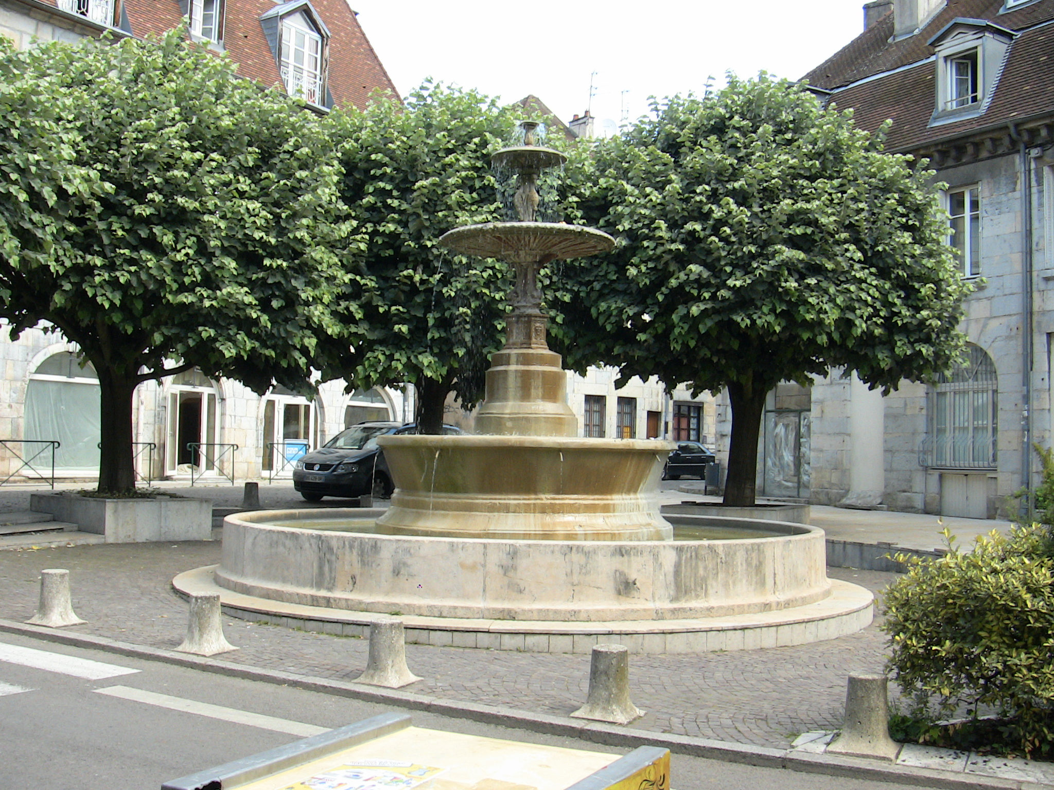 Fontaine de la place MARULAZ à Besançon.